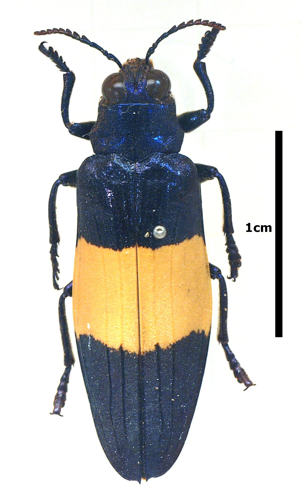 Callopistus castelnaudi from Malacca. Mounted specimen.